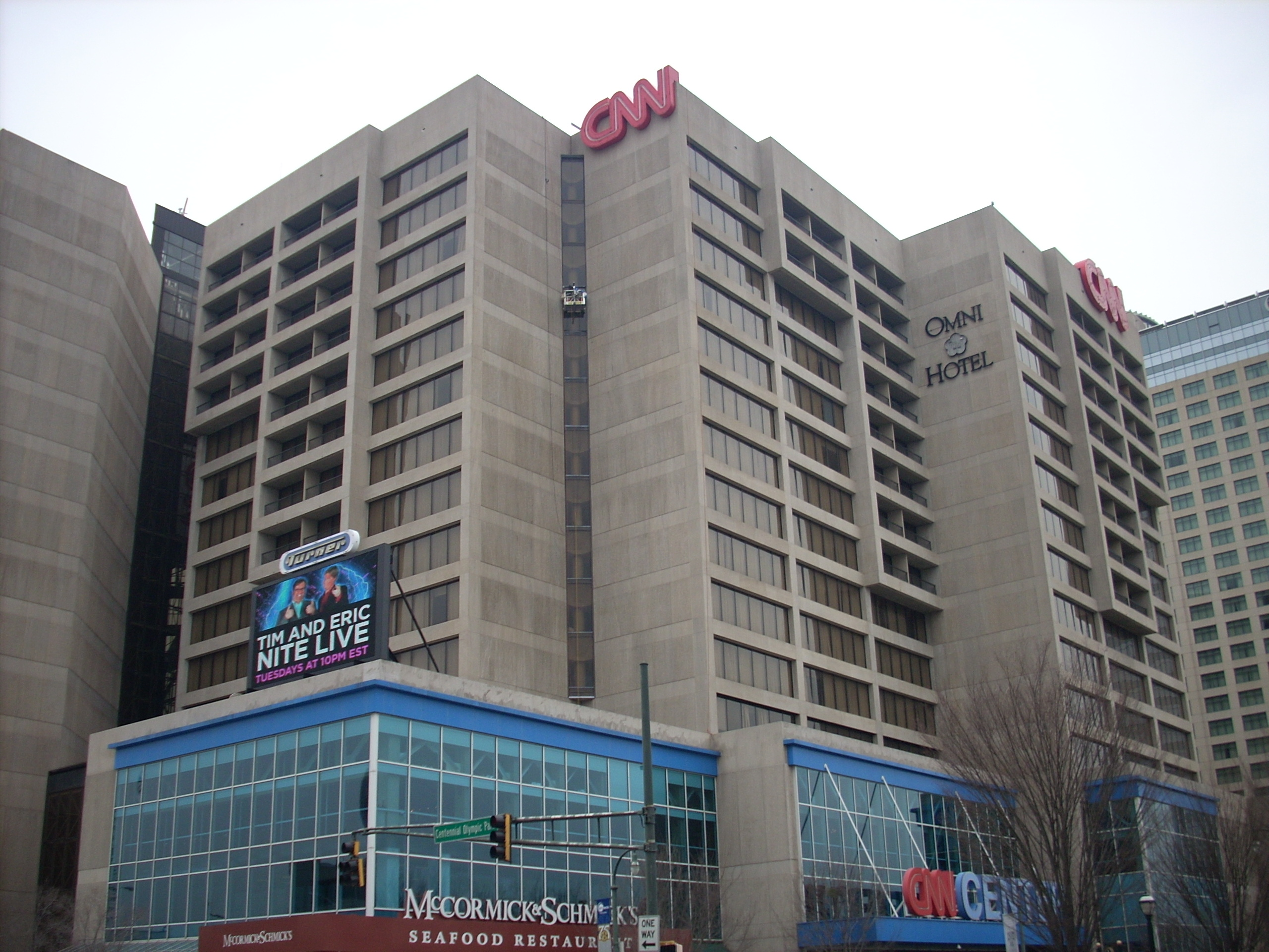 CNN ATLANTA MARCH 2008